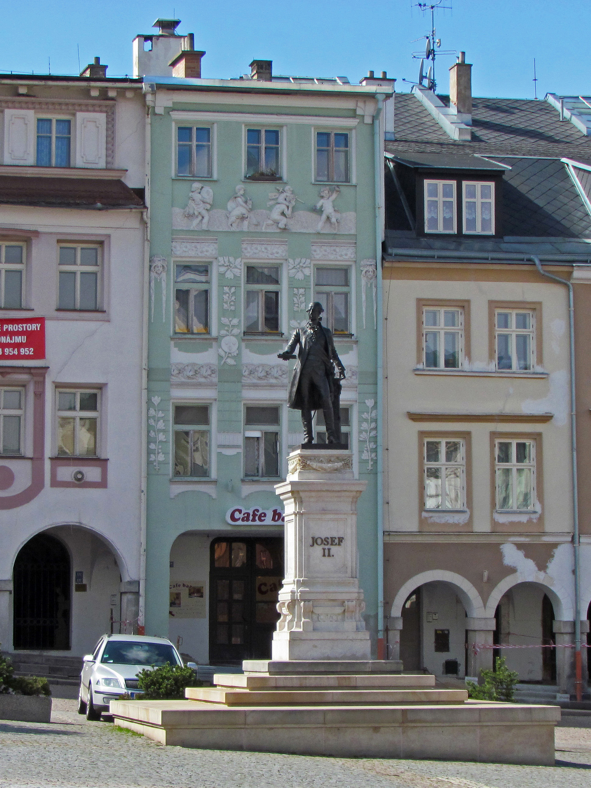 Josef II.-Denkmal auf dem Krakonošovo náměstí in Trautenau (Trutnov)